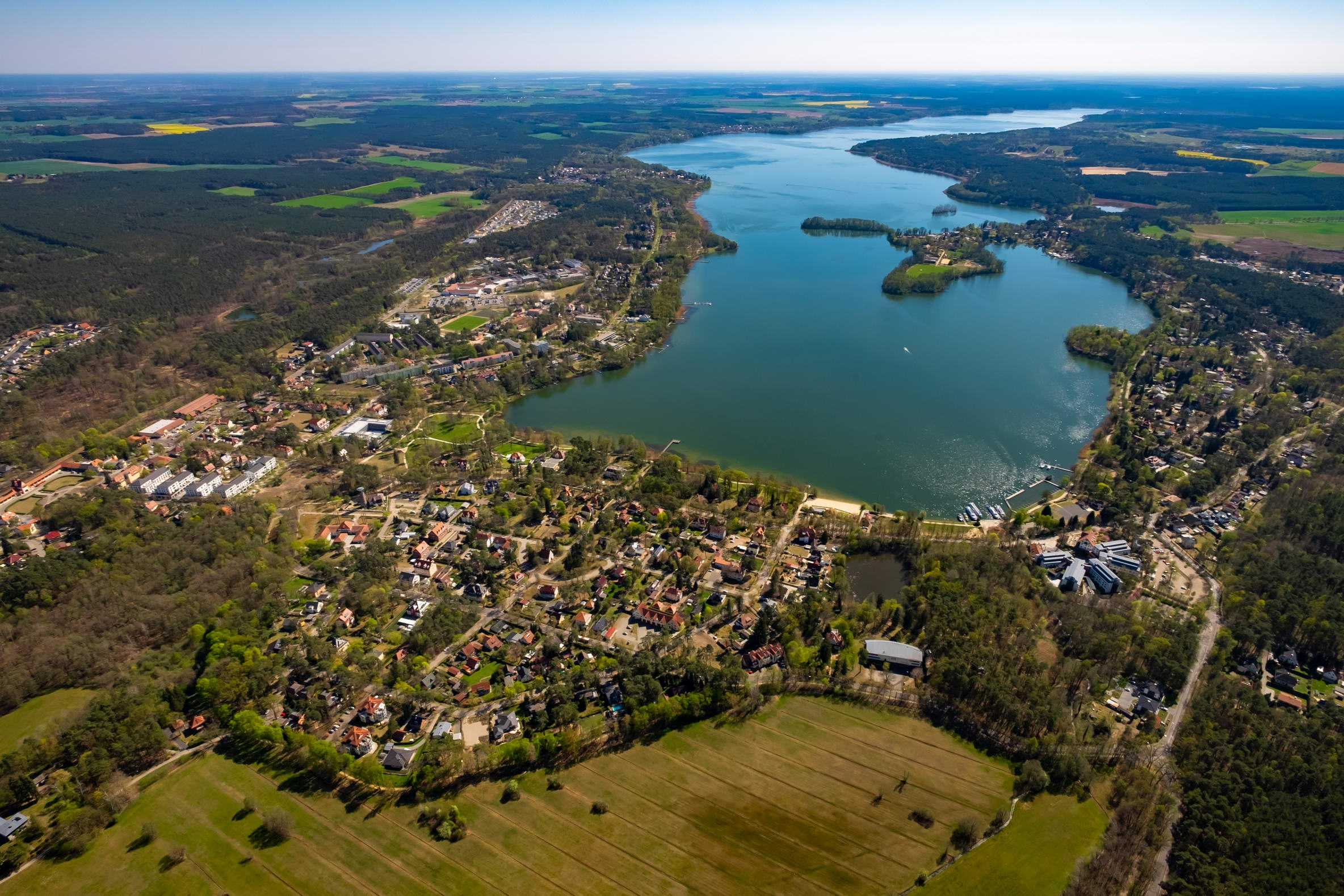 Bad Saarow